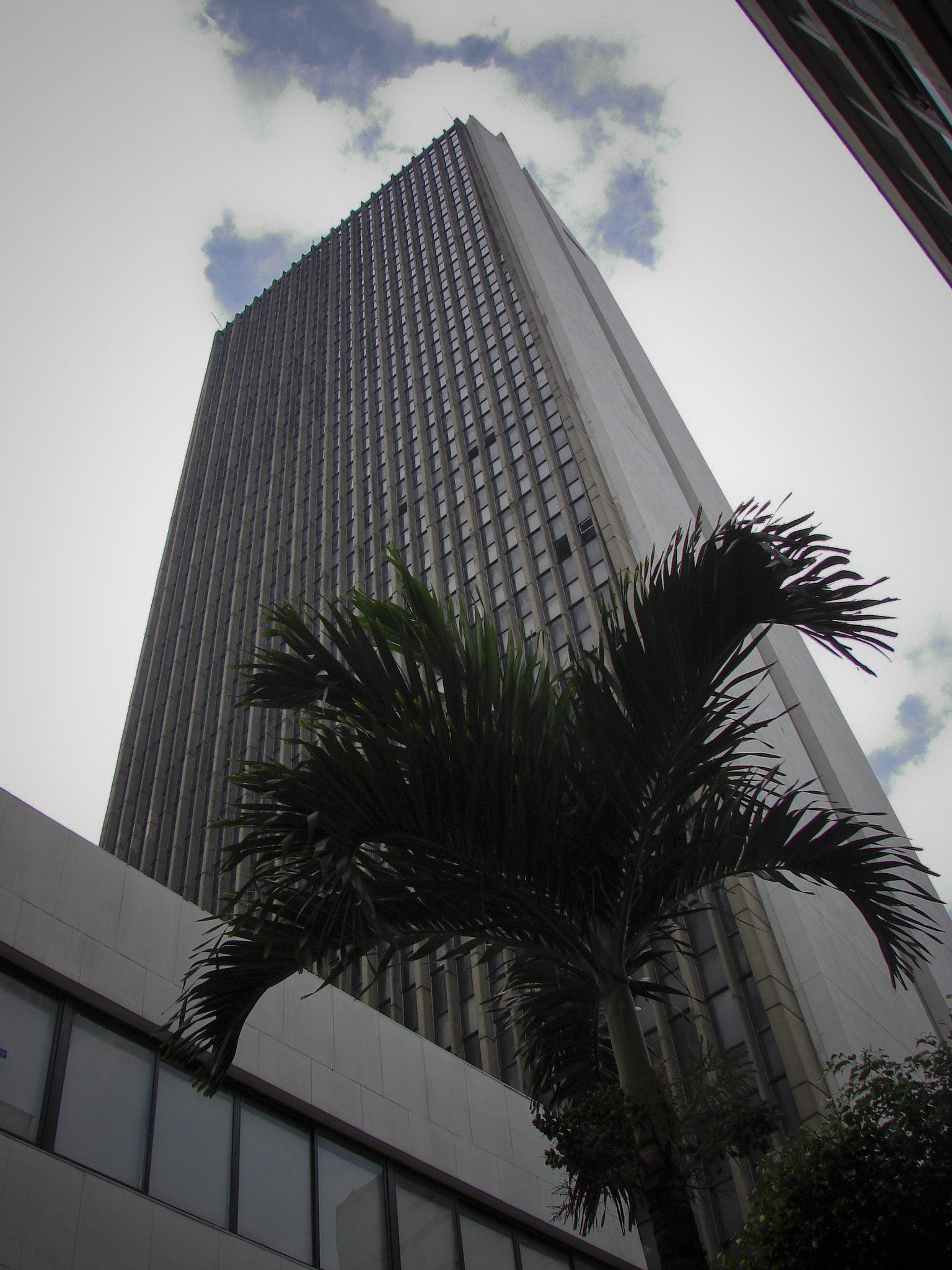 Edificio Coltejer, en el centro de Medellín. ColombiaMEDELLIN - COLOMBIA